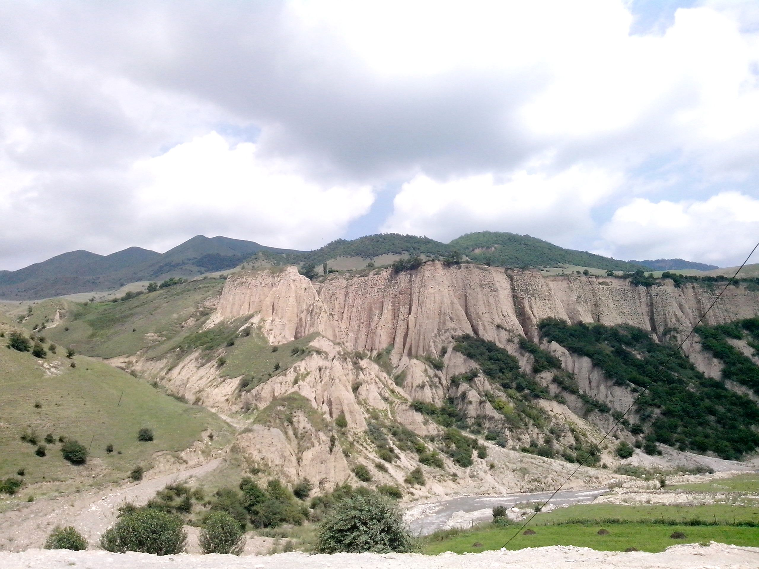 Qusar